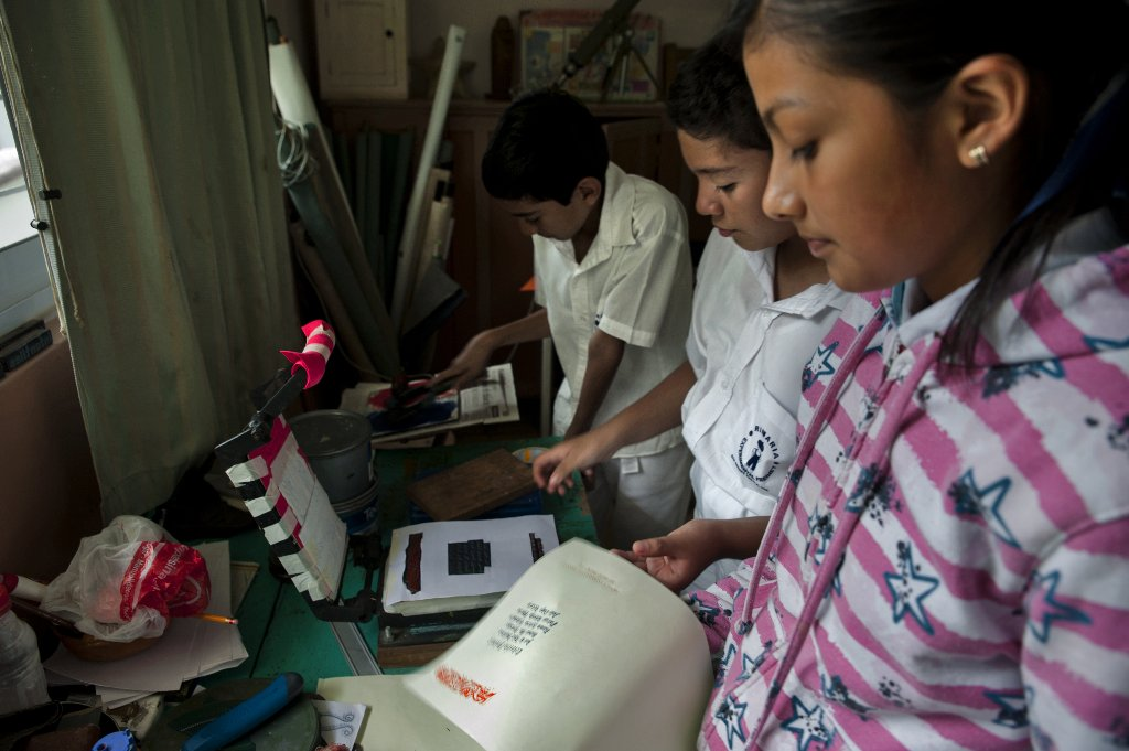 La Impremta Freinet a l'escola. Escuela Experimental Freinet, San Andrés Tuxtla, Veracruz México, 2013.